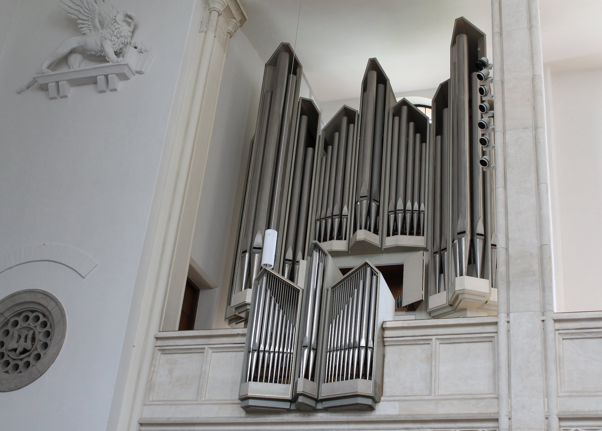 Ott-Orgel von St. Markus in München (1967, Paul Ott, III/29)